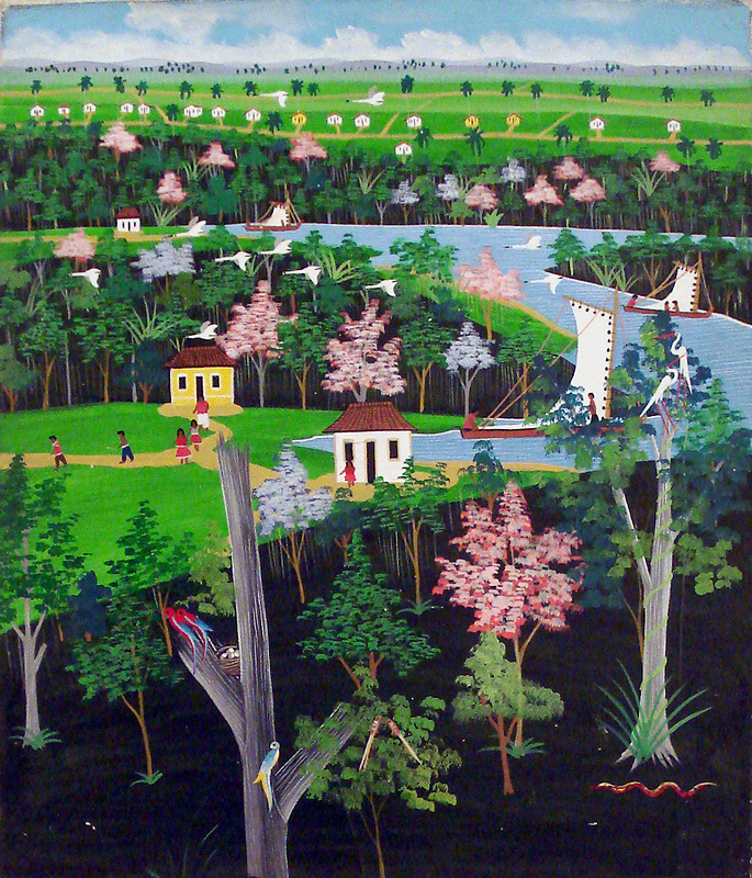 Paisagem naïf de autor desconhecido, sem data, possivelmente pernambucano dos anos 70. Coleção de Ricardo Frantz